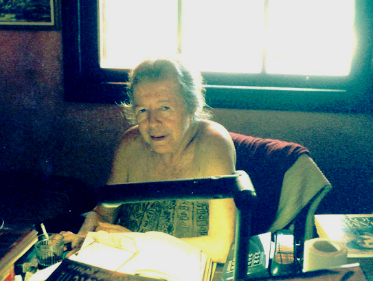 Hilda Hilst em seu escritório da Casa do Sol, Campinas-SP, Brasil. Outubro de 1998. Fotografia de Yuri Vieira.